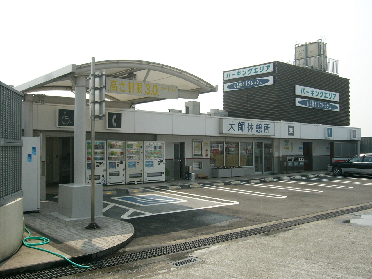 Daishi Parking Area